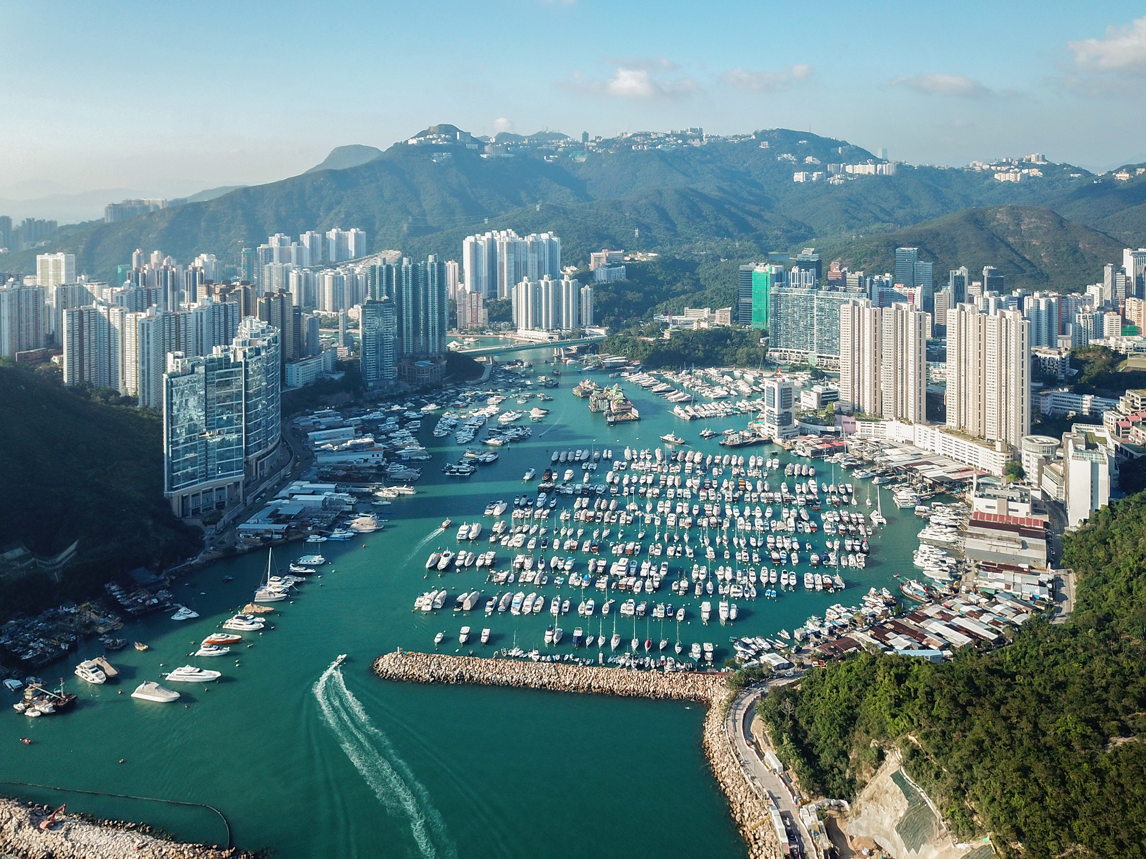 Sham Wan